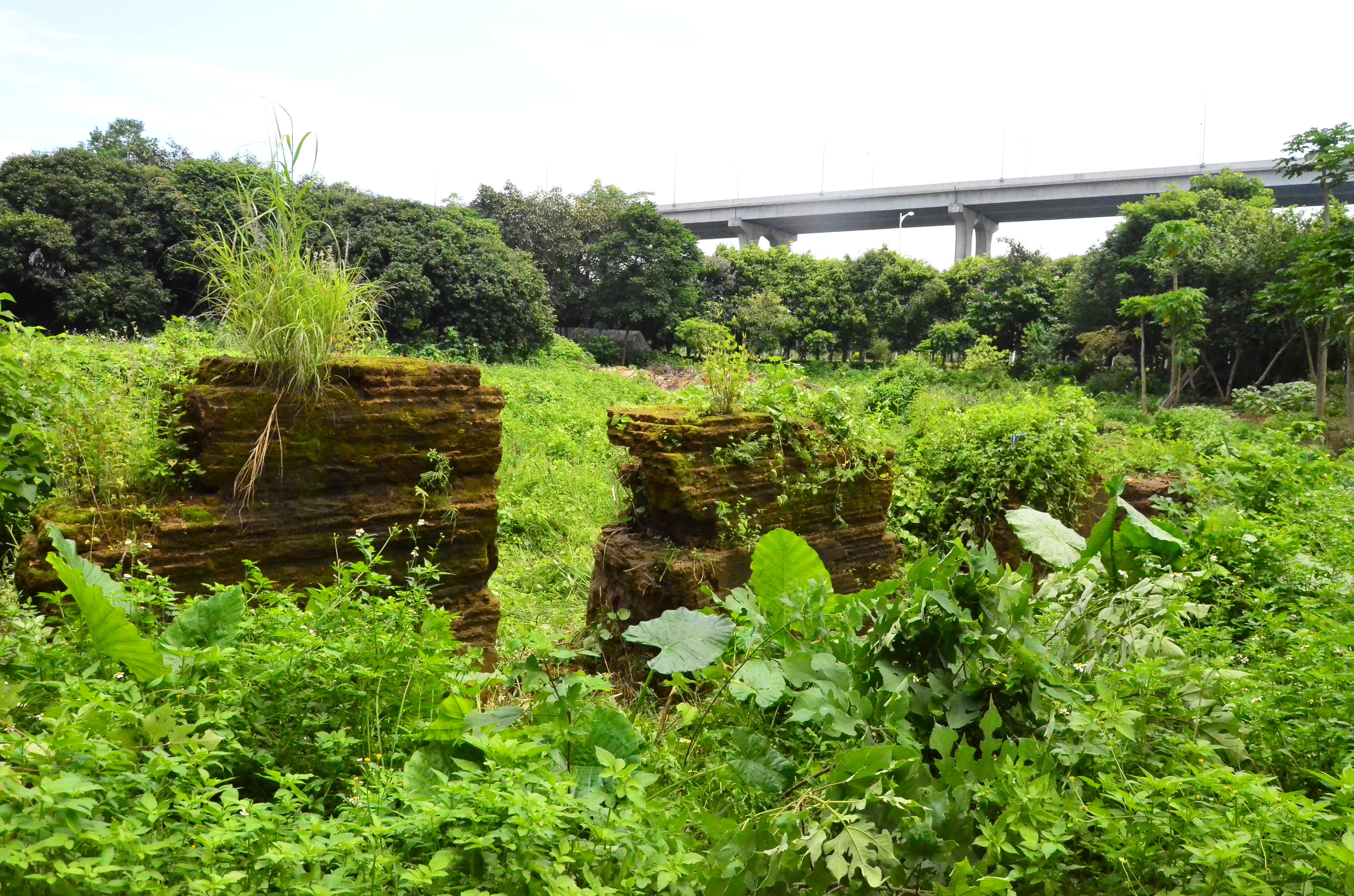 穗石村炮台遗址。位于广东省广州市番禺区小谷围街道穗石村北约马展冈，广东药科大学内。